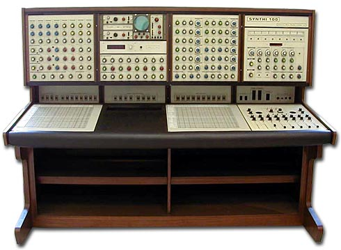 Sintetizzatore EMS Synthi 100 Licensing Categoria:Sintetizzatori Categoria:Sintetizzatori EMS